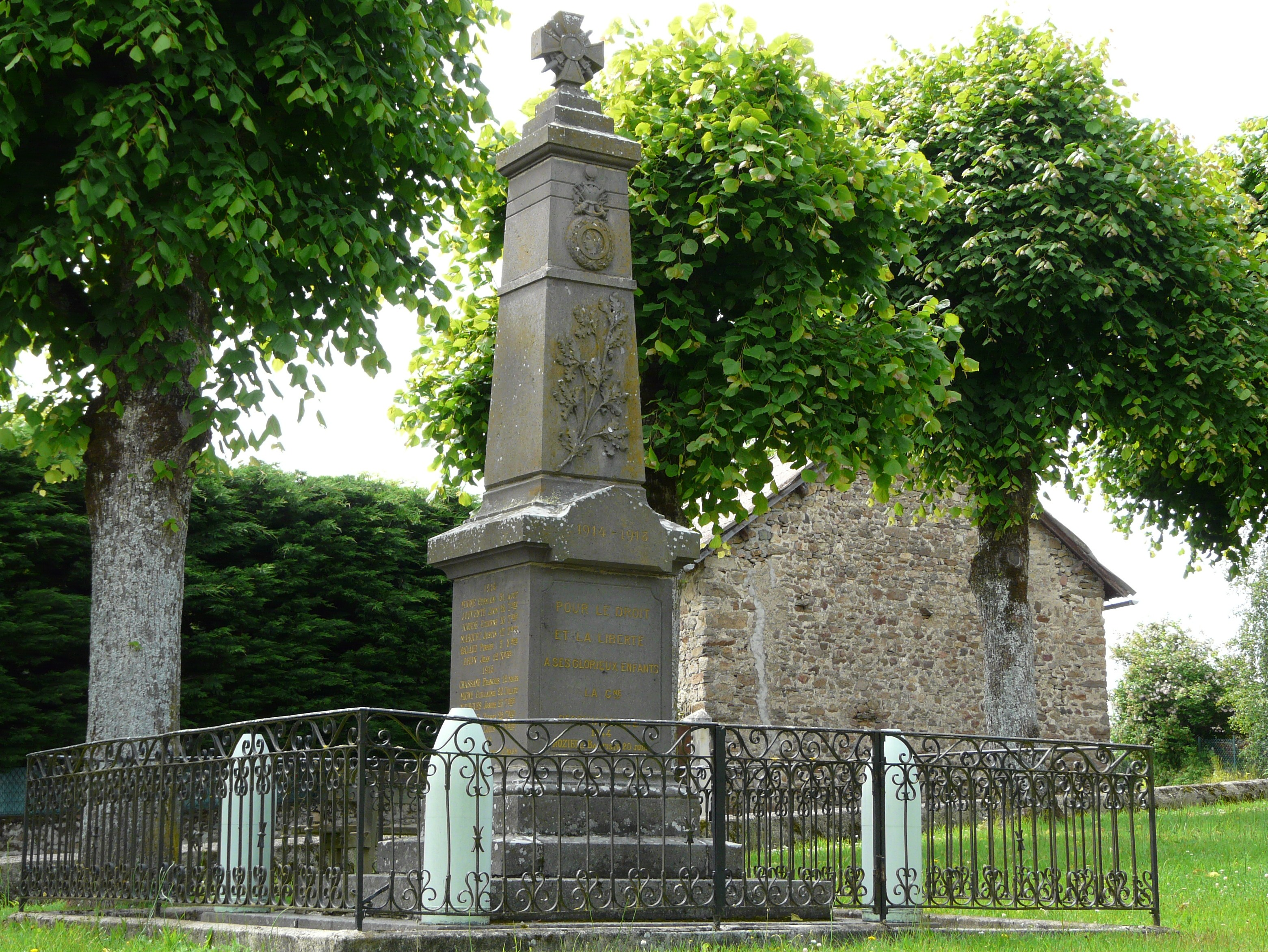 Le monument aux morts d'Anglards-de-Saint-Flour, Cantal, France.